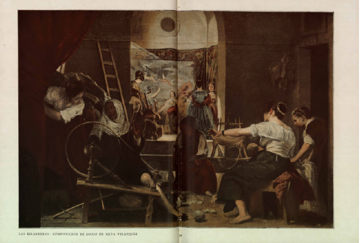 Imagen de Hispania (revista) nº7 monografia de Velazquez